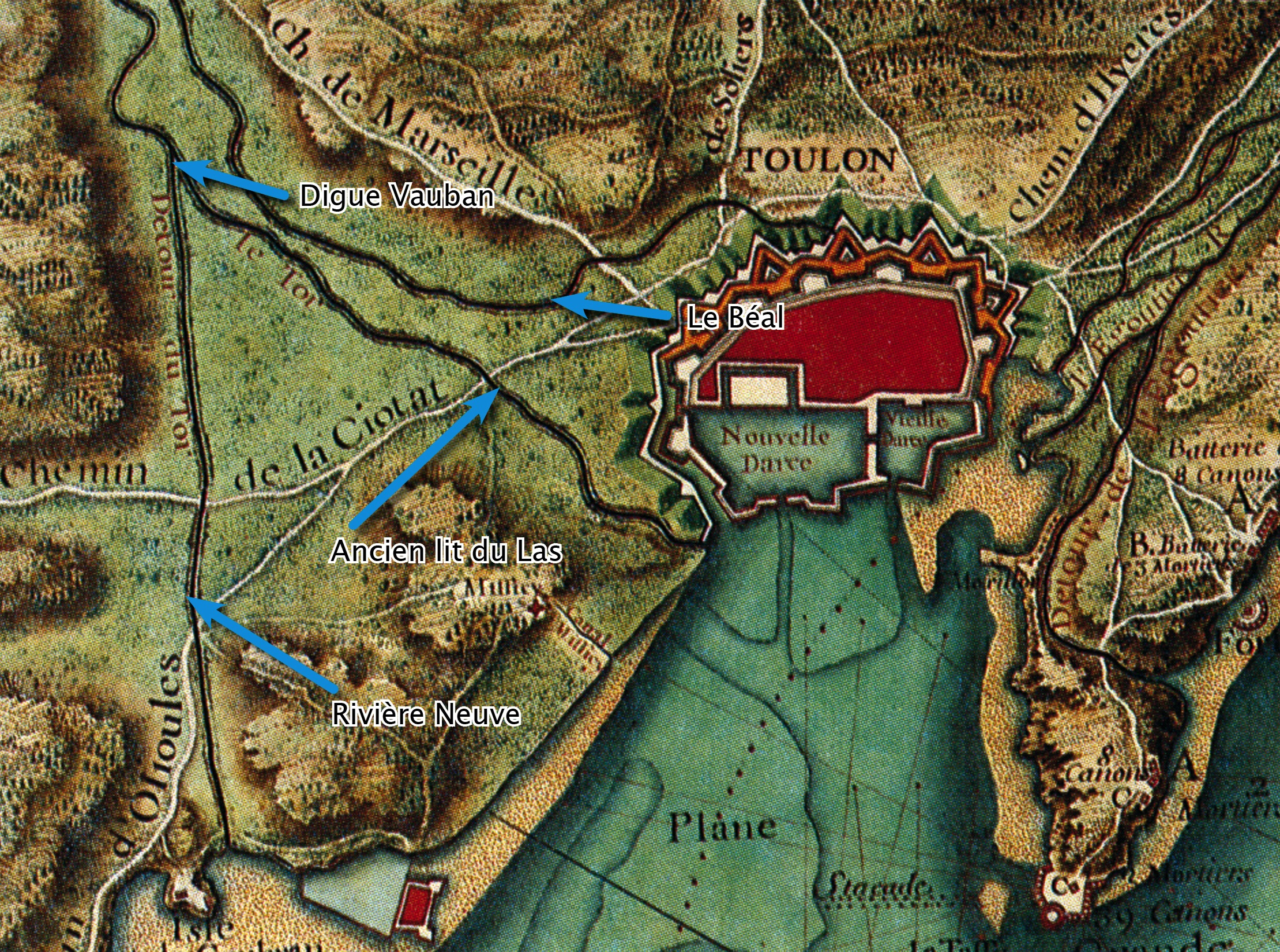 Détournement du Las vers 1680